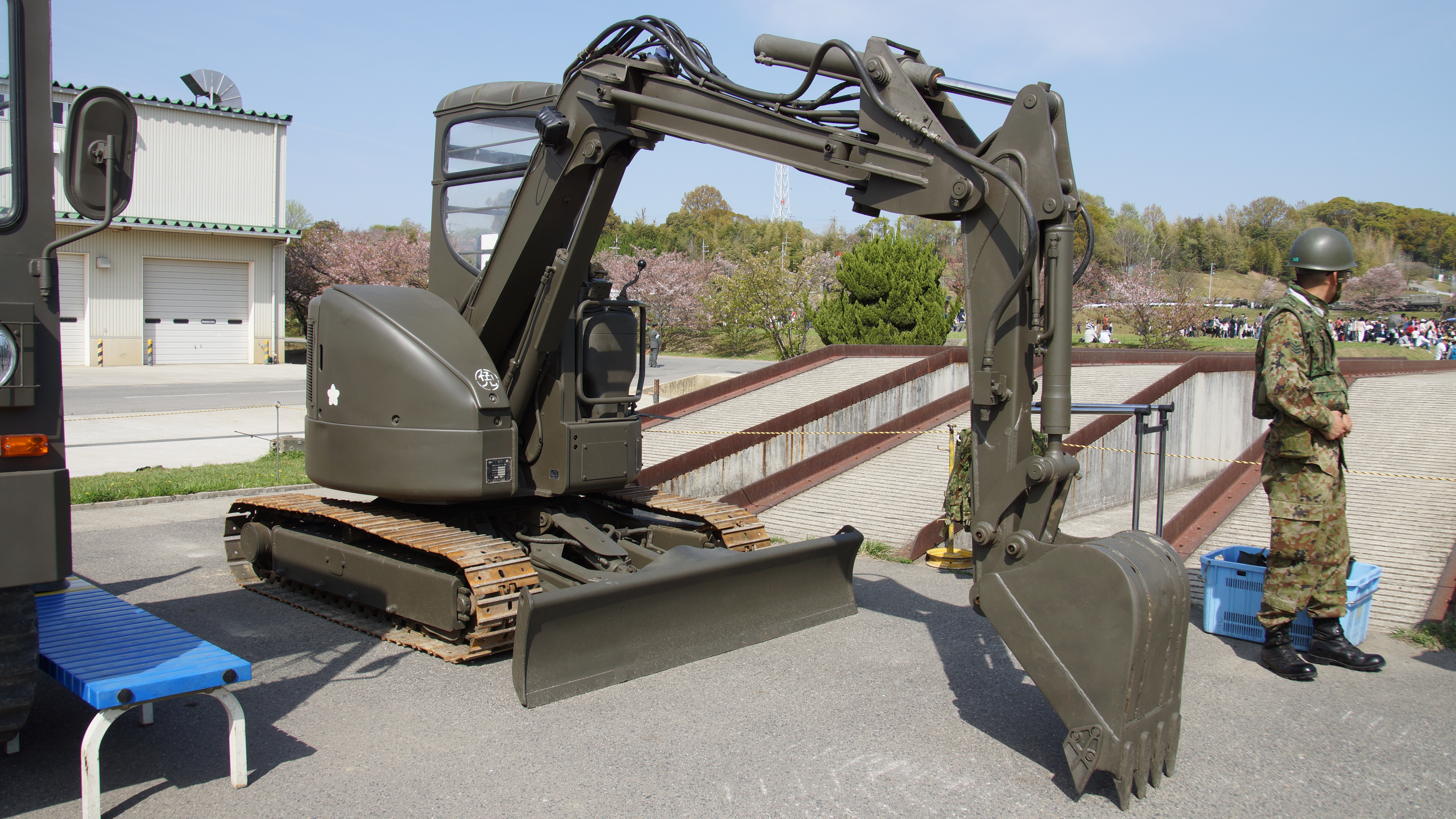 陸上自衛隊 小型ショベルドーザ A型（05-5045号車） 右前面。2017年4月16日 信太山駐屯地にて。